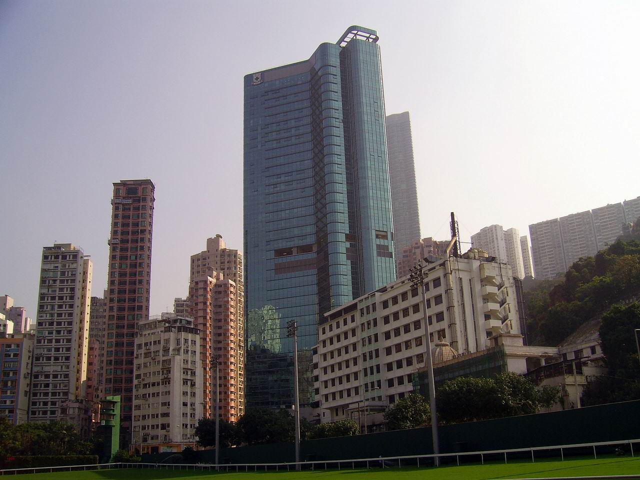 中文（香港）: 養和醫院